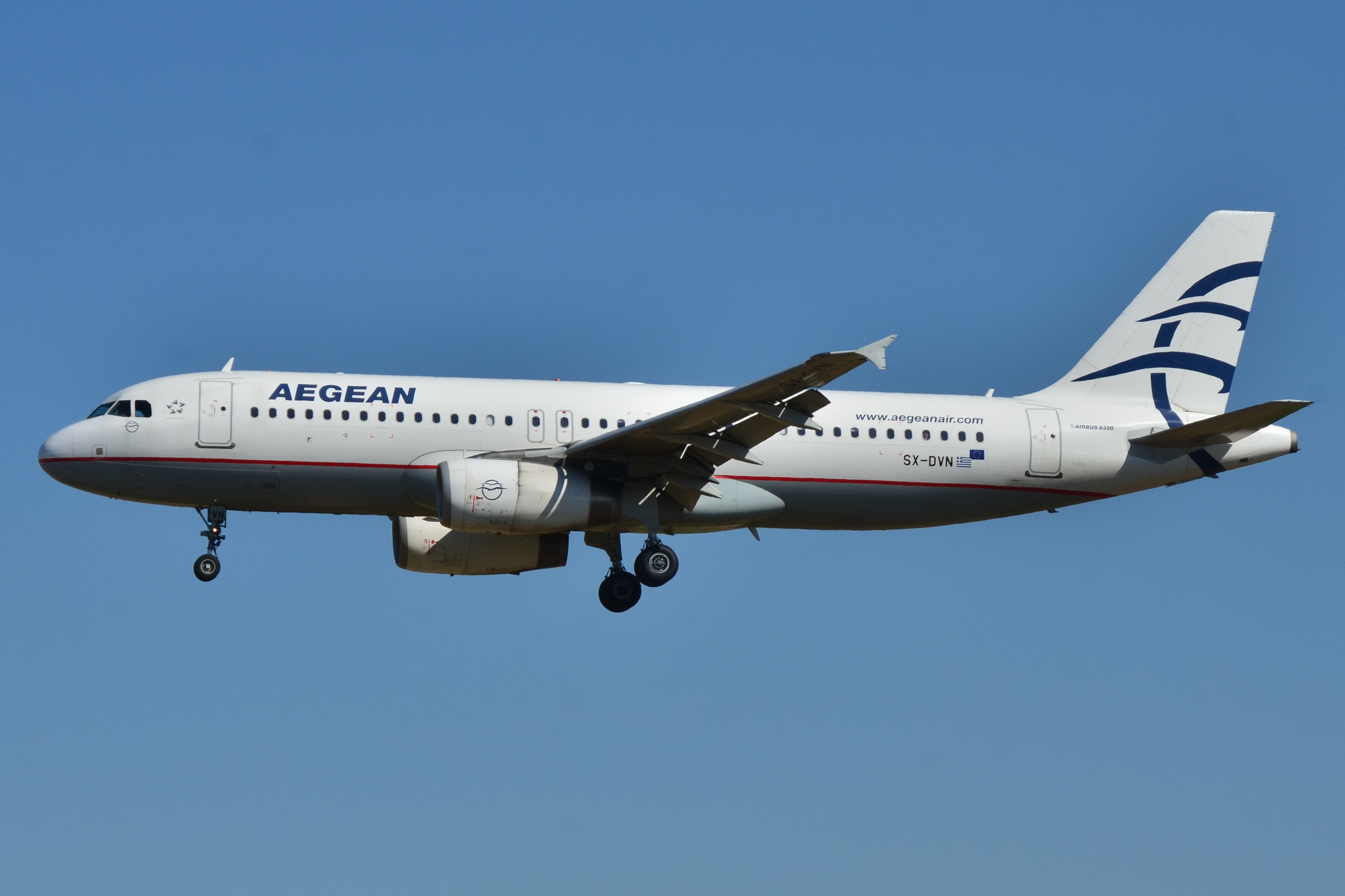 Photo prise à l'aéroport de Barcelone-El Prat (LEBL) en Espagne. Picture take at Barcelona-El Prat Airport (LEBL) in Spain.